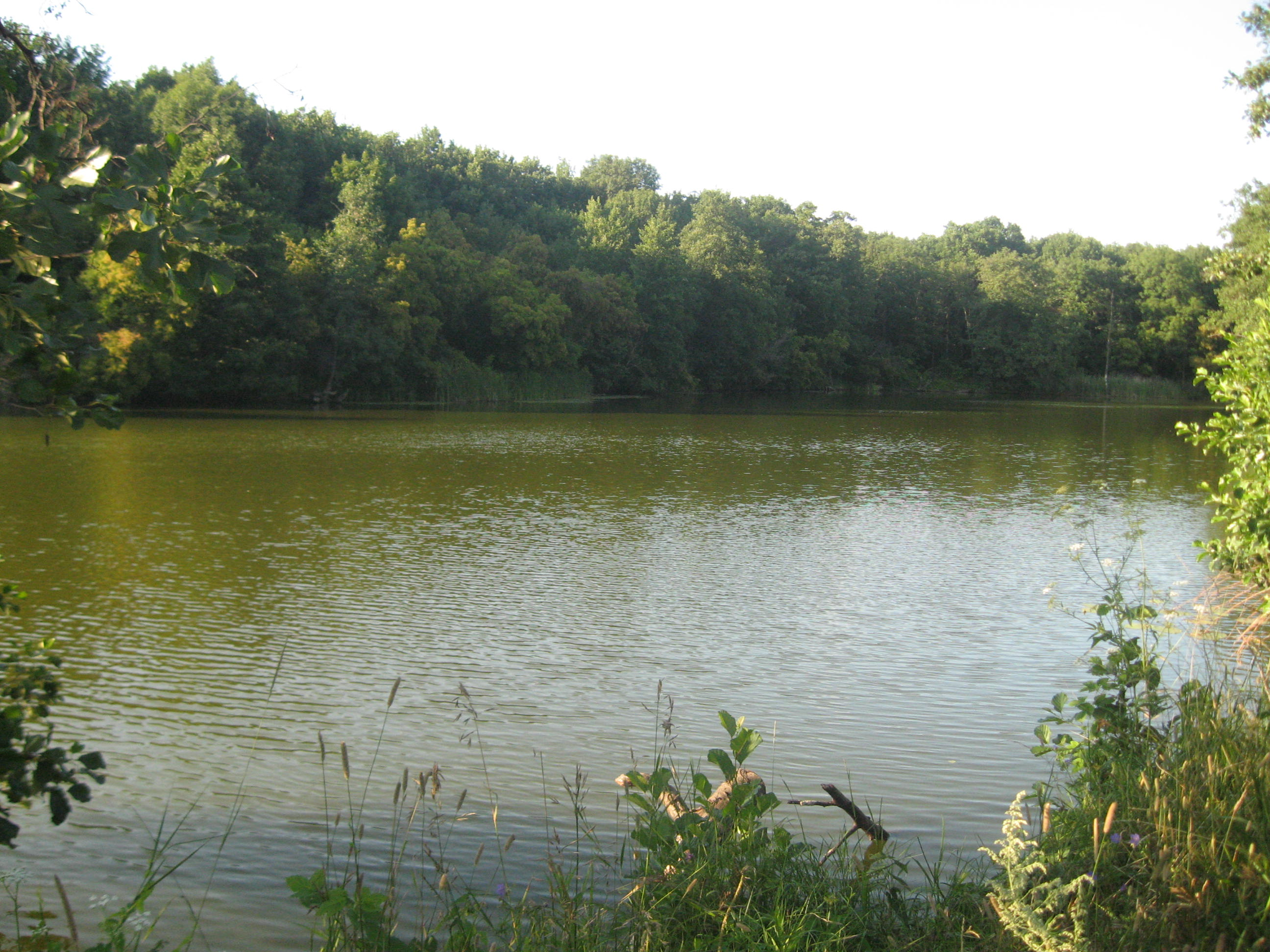 Видна река.